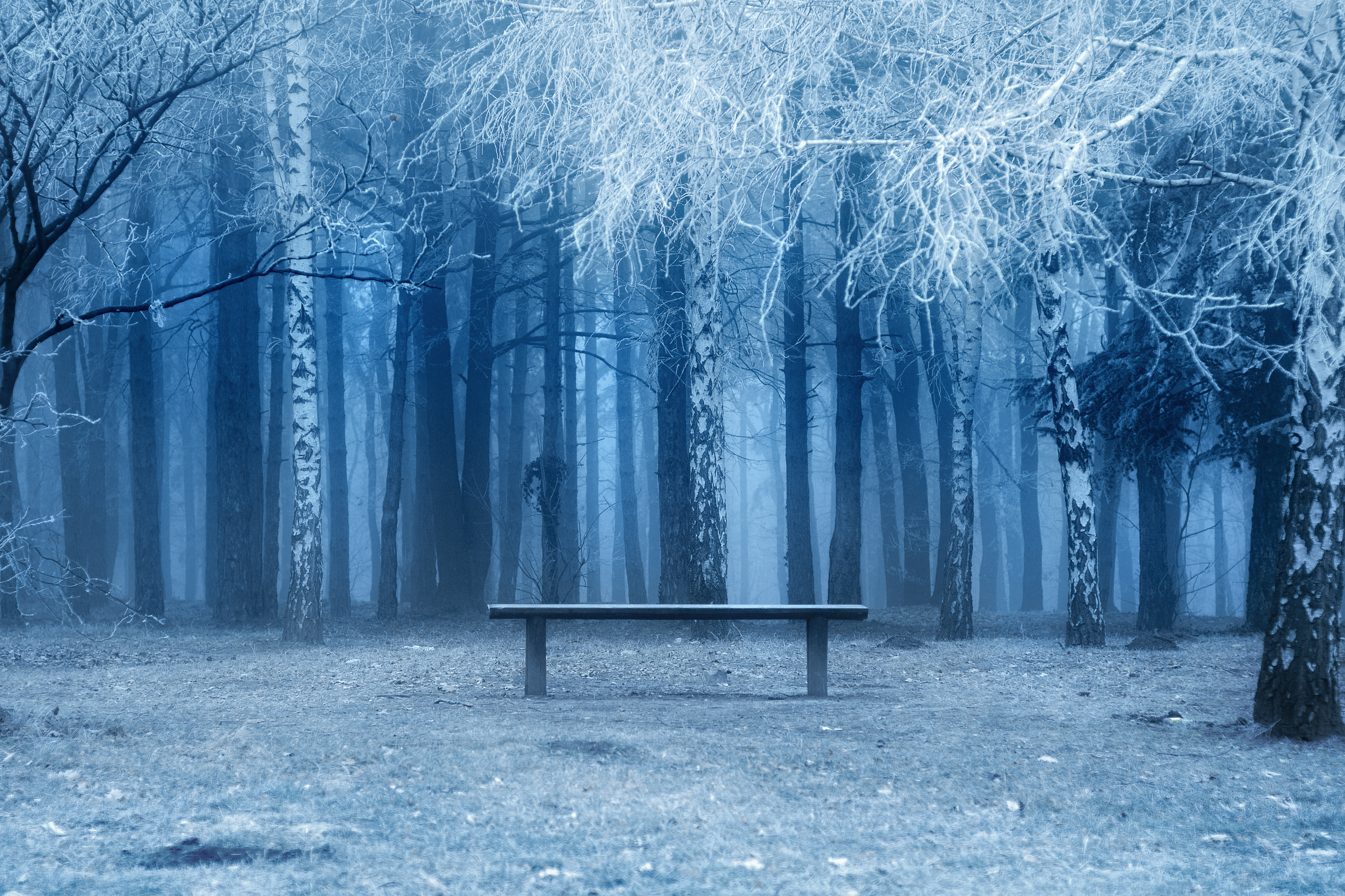 Ово је фотографија заштићеног природног добра у Србији под шифром: СП036This is a a photo of a natural area in Serbia with ID: СП036